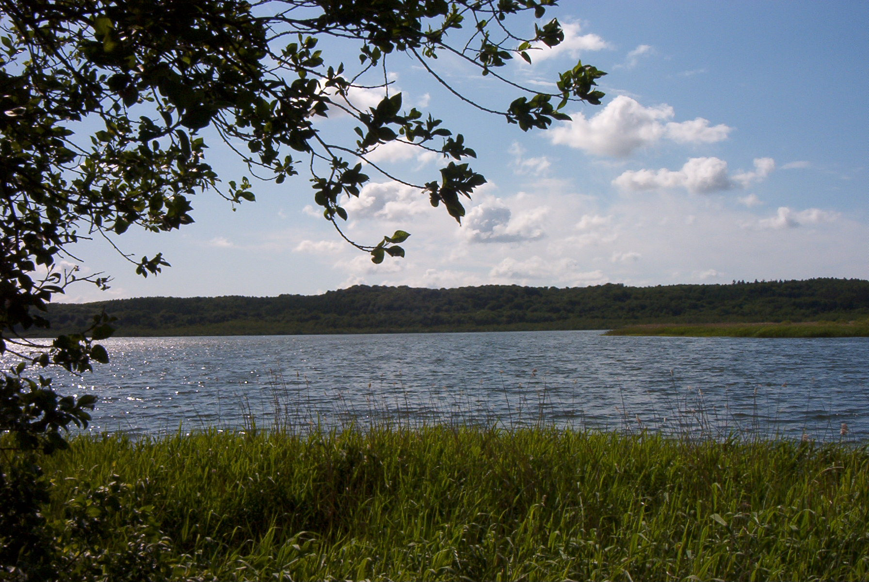 Rügen: Schmachter See bei Binz